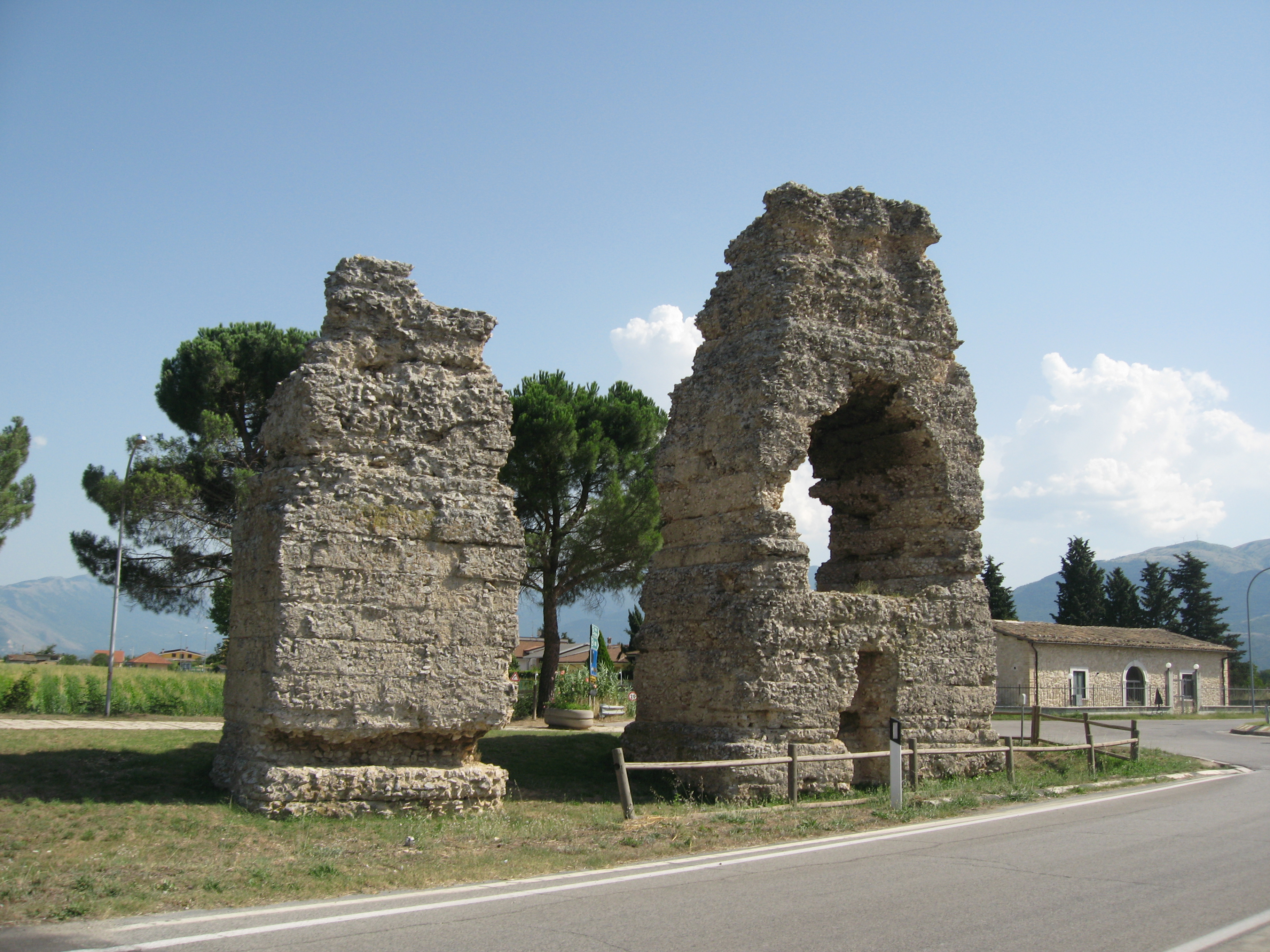 Parco archeologico di Corfinium